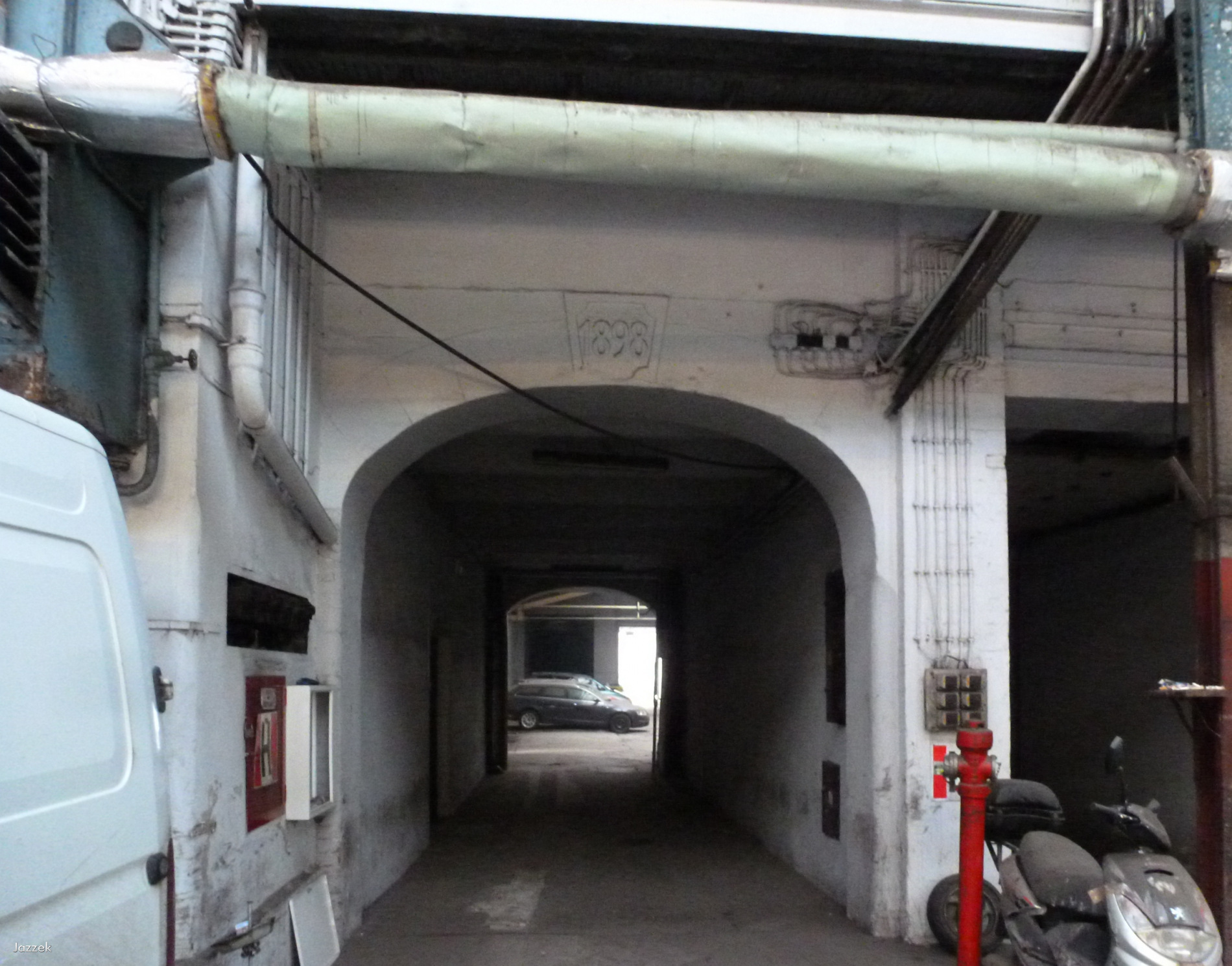 Brama wjazdowa do dawnej fabryki samochodów Otto Beckmann we Wrocławiu przy ul. Kościuszki 120-124a (dawna Neue Tauentzien Strasse)